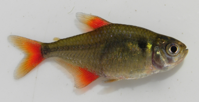 ejemplar hembra de Rocha, Uruguay